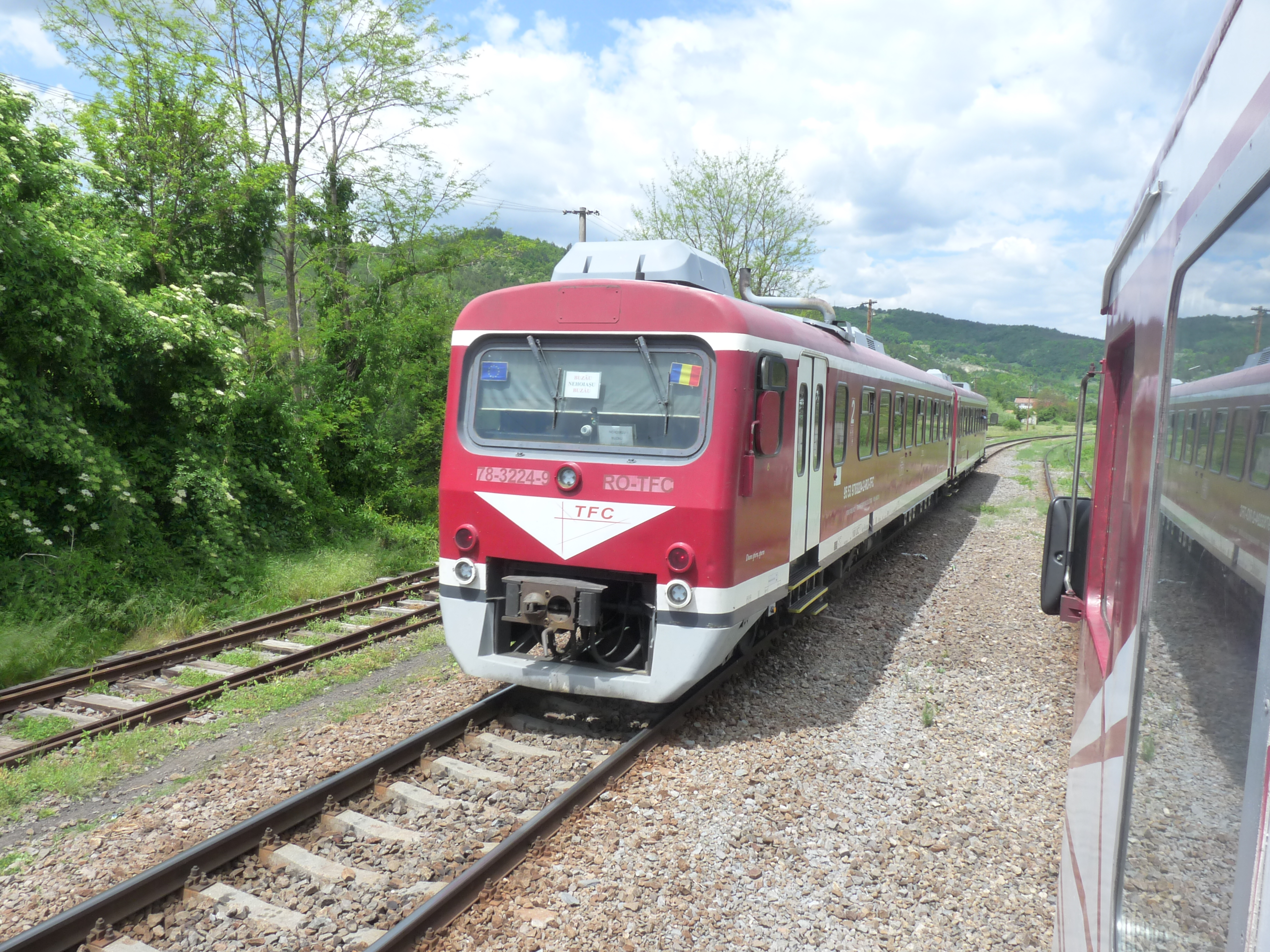 Een kruising van twee TFC treinen in Pătârlagele